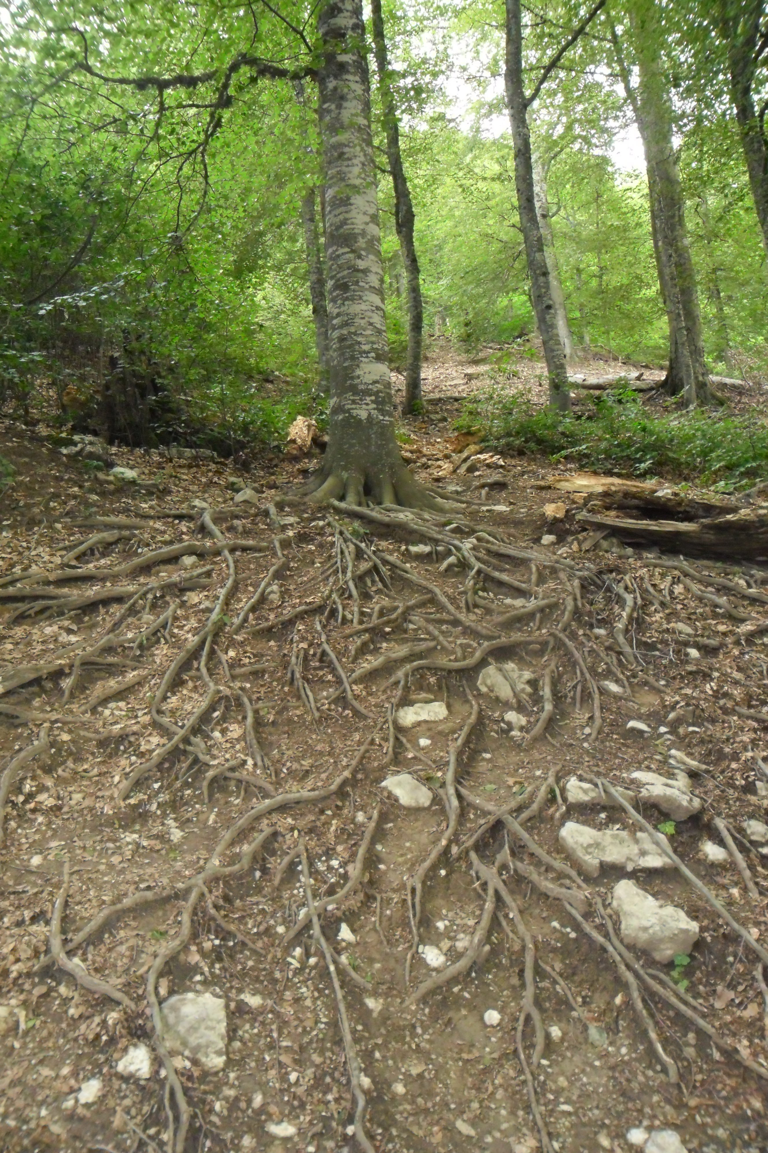 Фото